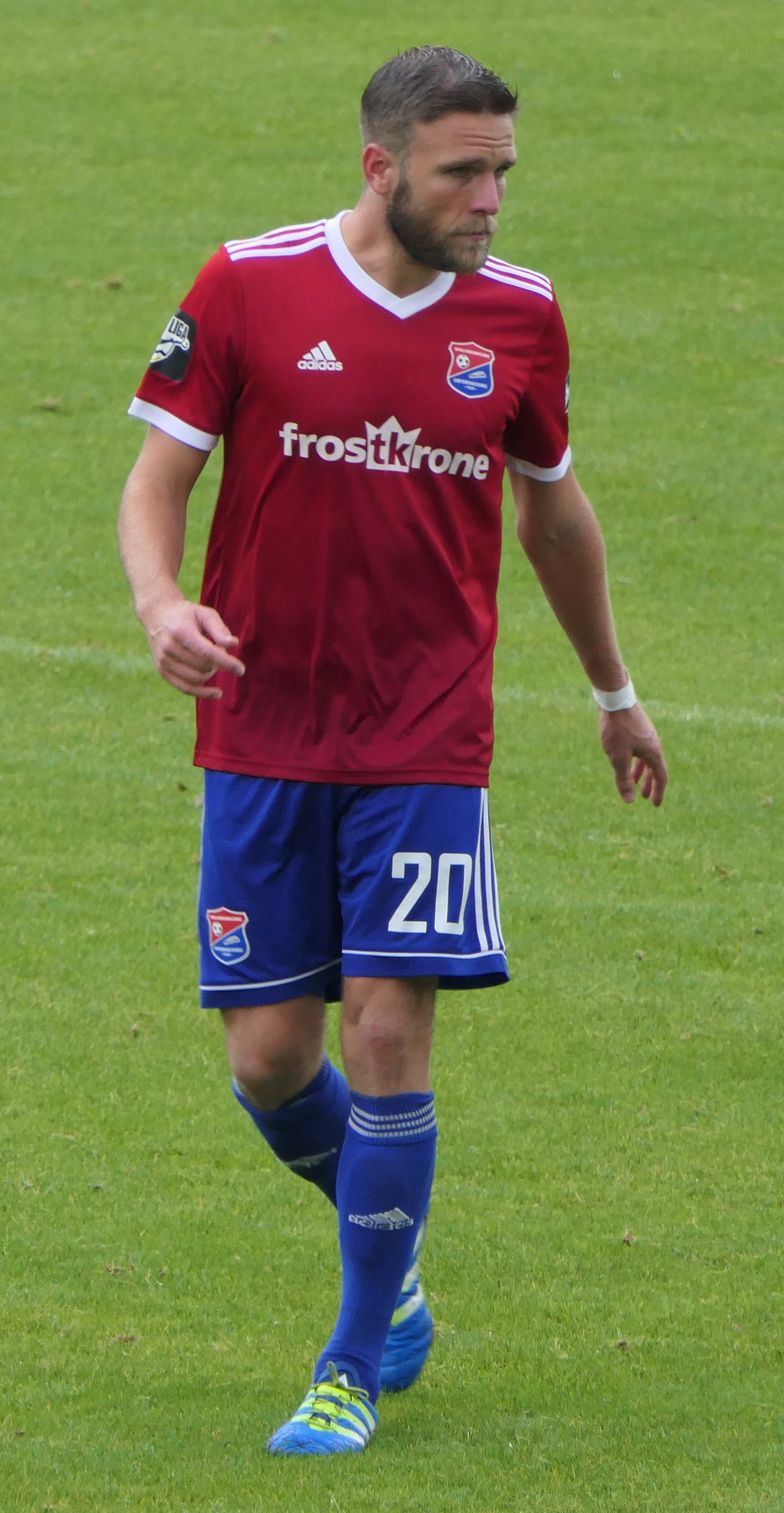 Der Fussballprofi Dominik Stahl im Trikot der SpVgg Unterhaching beim Heimspiel gegen Eintracht Braunschweig am 01.09.2018.